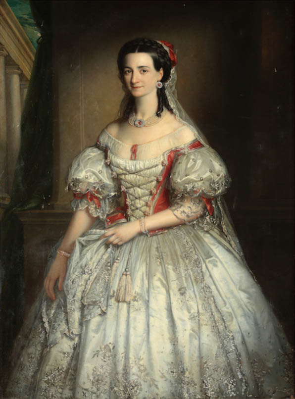 Hollósy Kornélia de Gertenyes (1827–1890), Hungarian opera singer